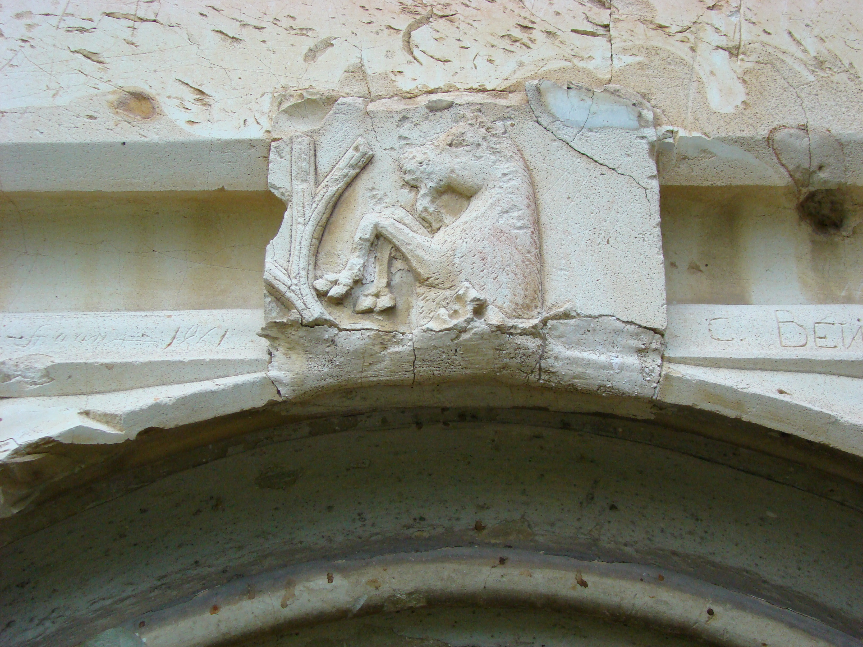 Szilágyi Familienwappen - Evangelische Kirche von Vingard (Weingartskirchen), Alba, Siebenbürgen, Rumänien